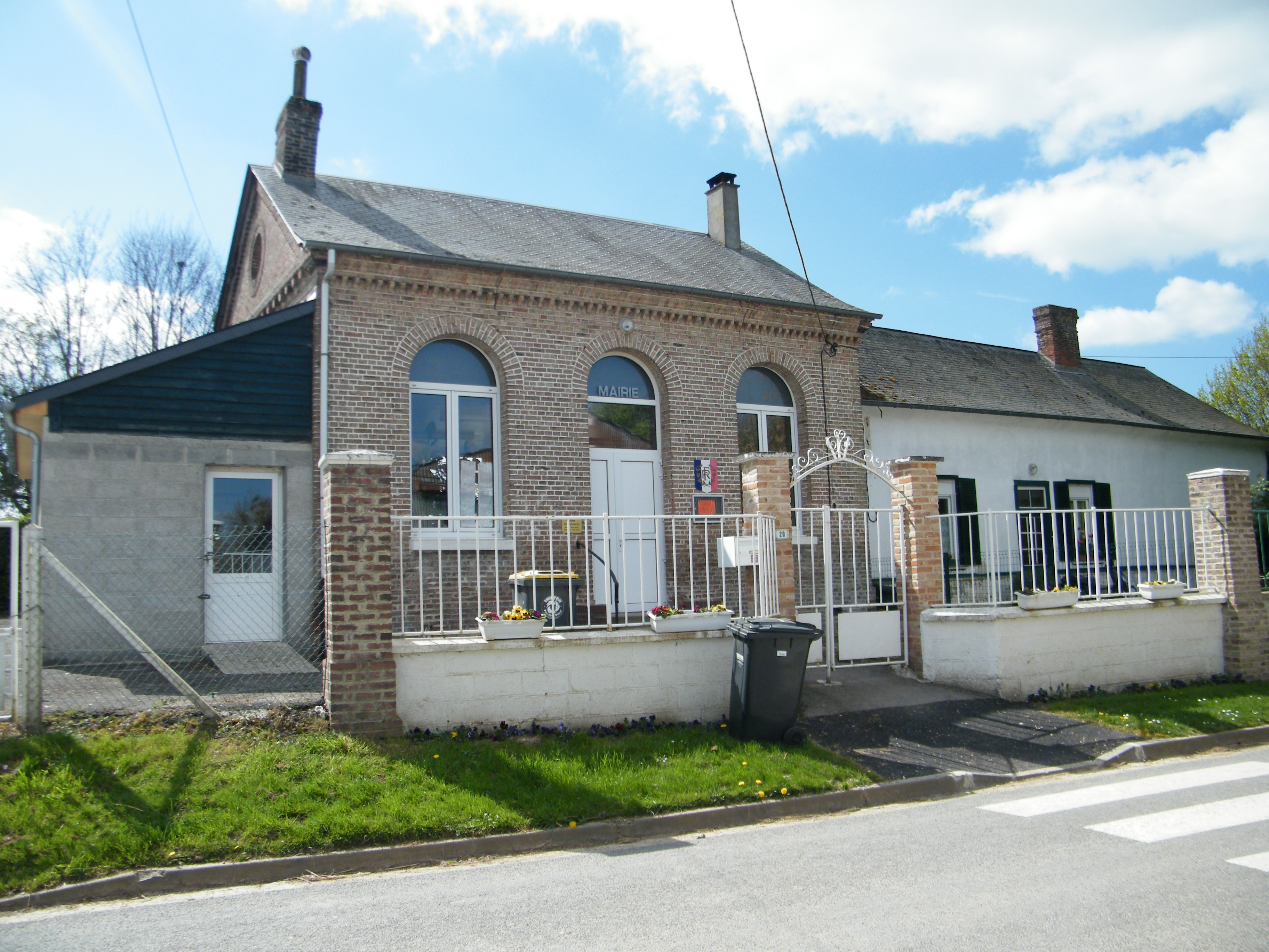 La mairie.